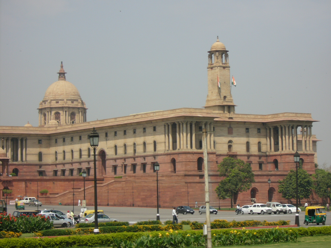 Indian Parliament Building Delhi India